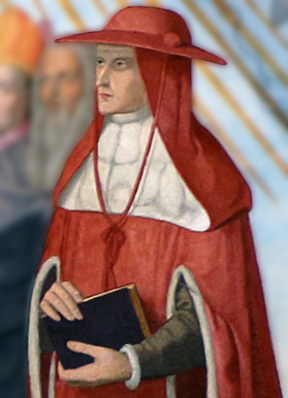 Sigerio de Brabante en el fresco en la Sala Dante del Casino Massimo en Roma, por Philipp Veit, 1817-1827.